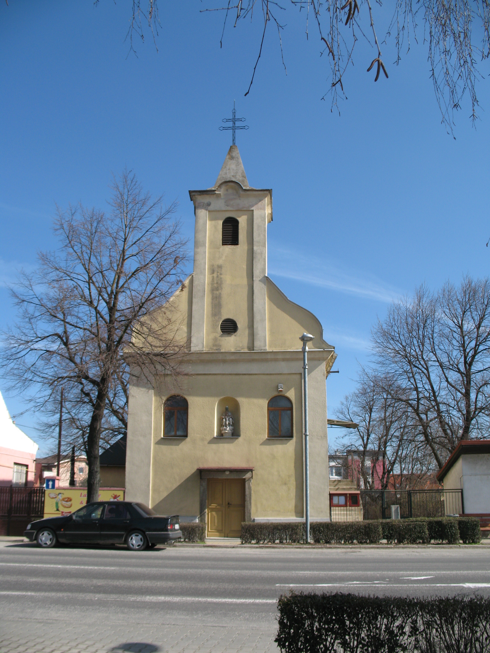 Csölle